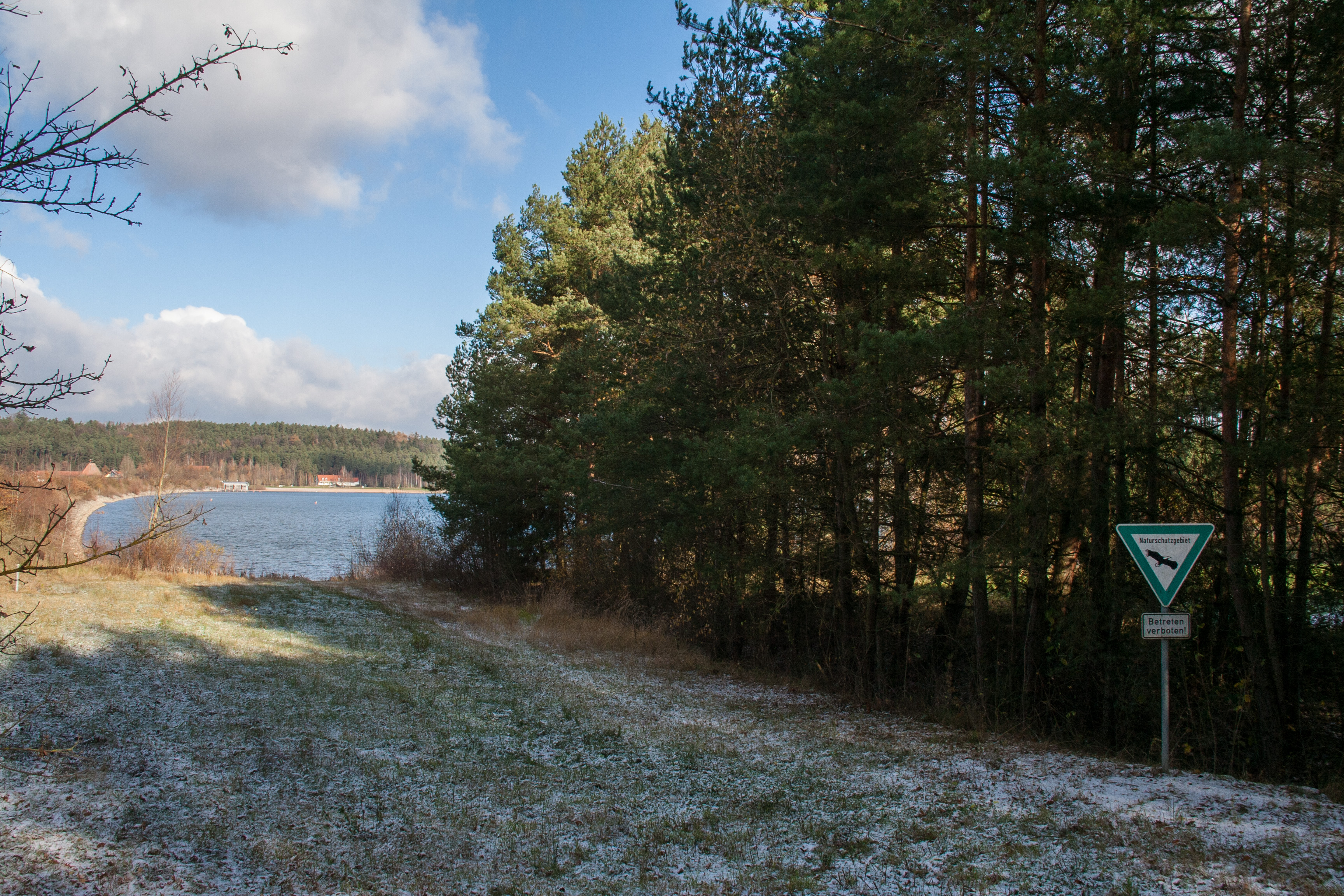 Kleiner Brombachsee, Naturschutzgebiet Grafenmühle